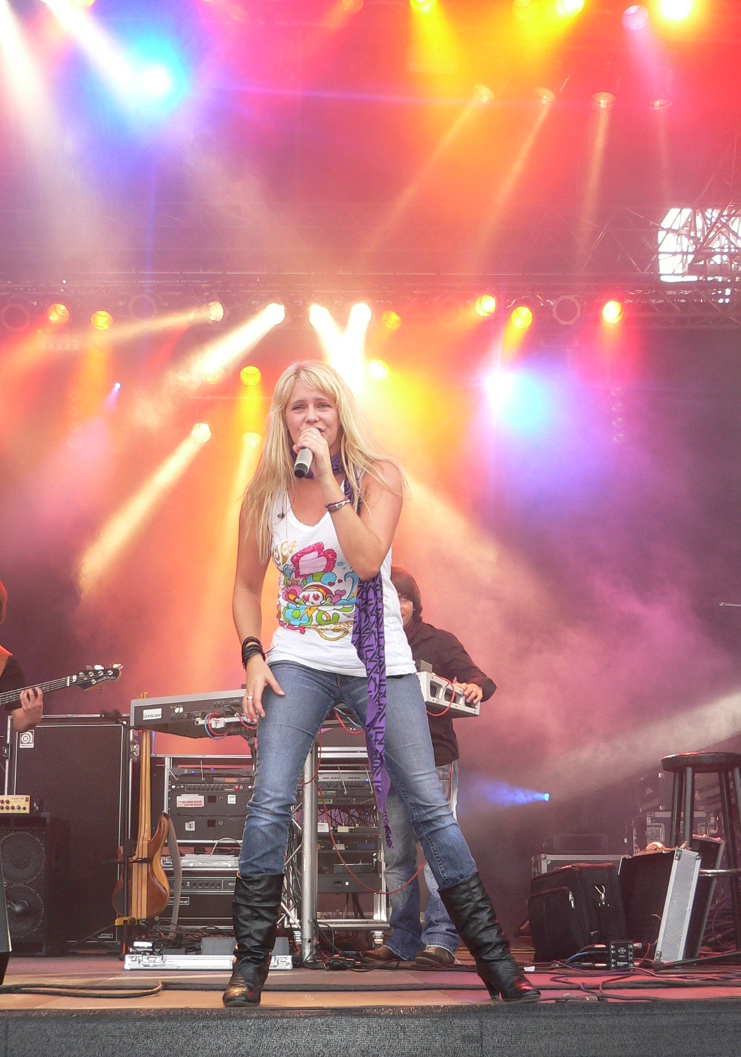 Janine Meyer (Jini), Frontfrau von Luxuslärm